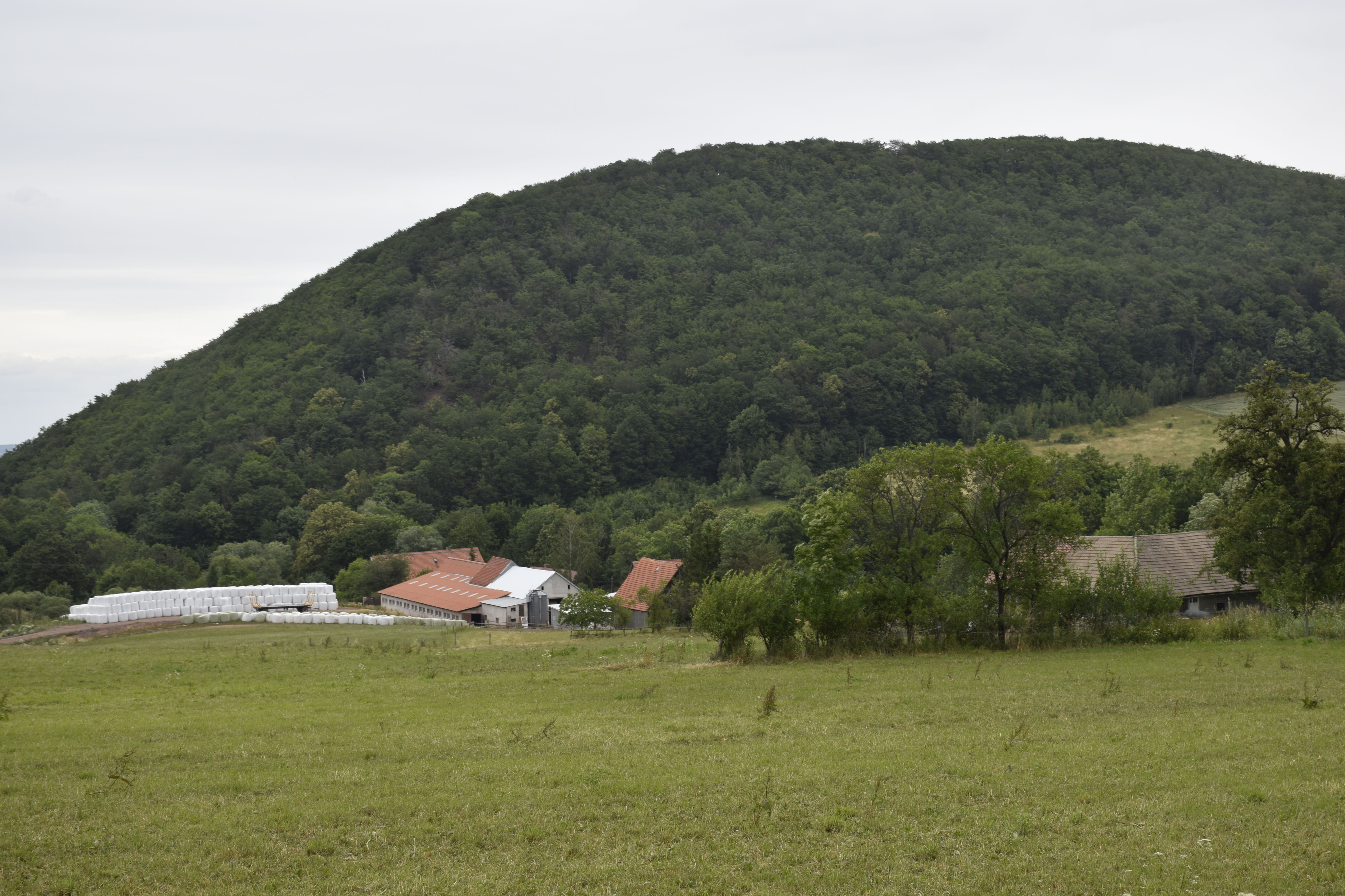 Nagórnik (województwo dolnośląskie). Polska